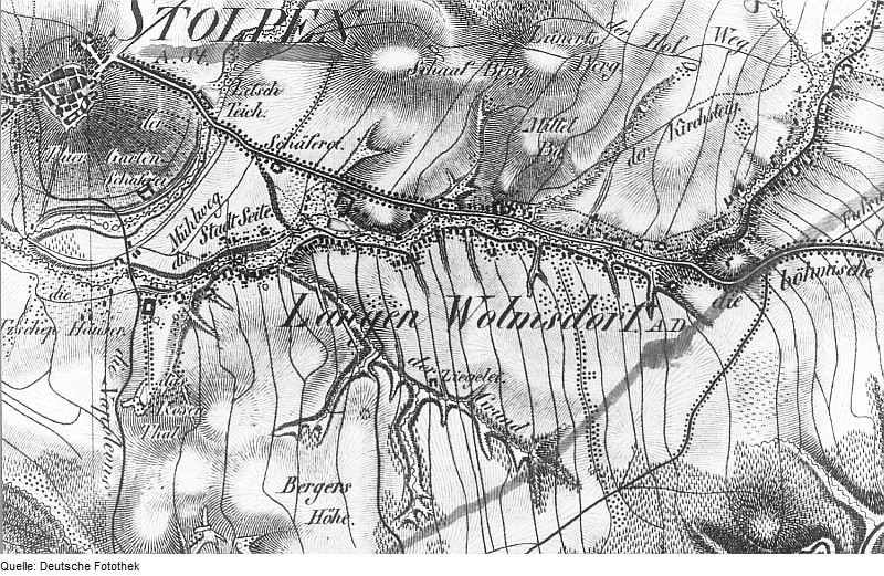 Original image description from the Deutsche Fotothek Stolpen-Langenwolmsdorf. Oberreit, Sect. Stolpen, 1821/22